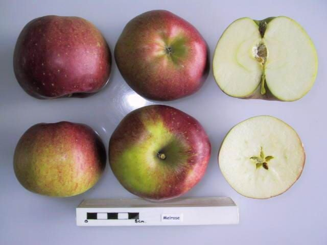 Melrose